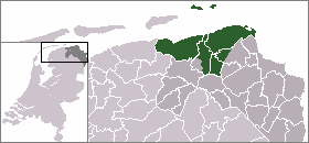 Hunzegoa.